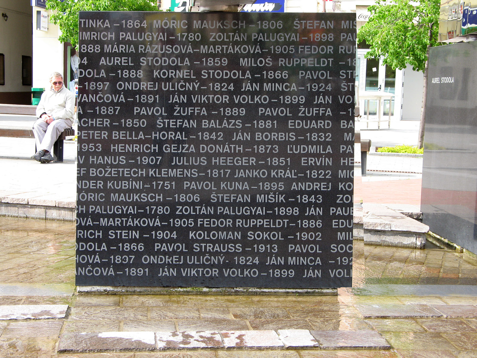 Fontána Metamorfózy. Tabuľa s menami významných osobností narodených v Liptovskom Mikuláši